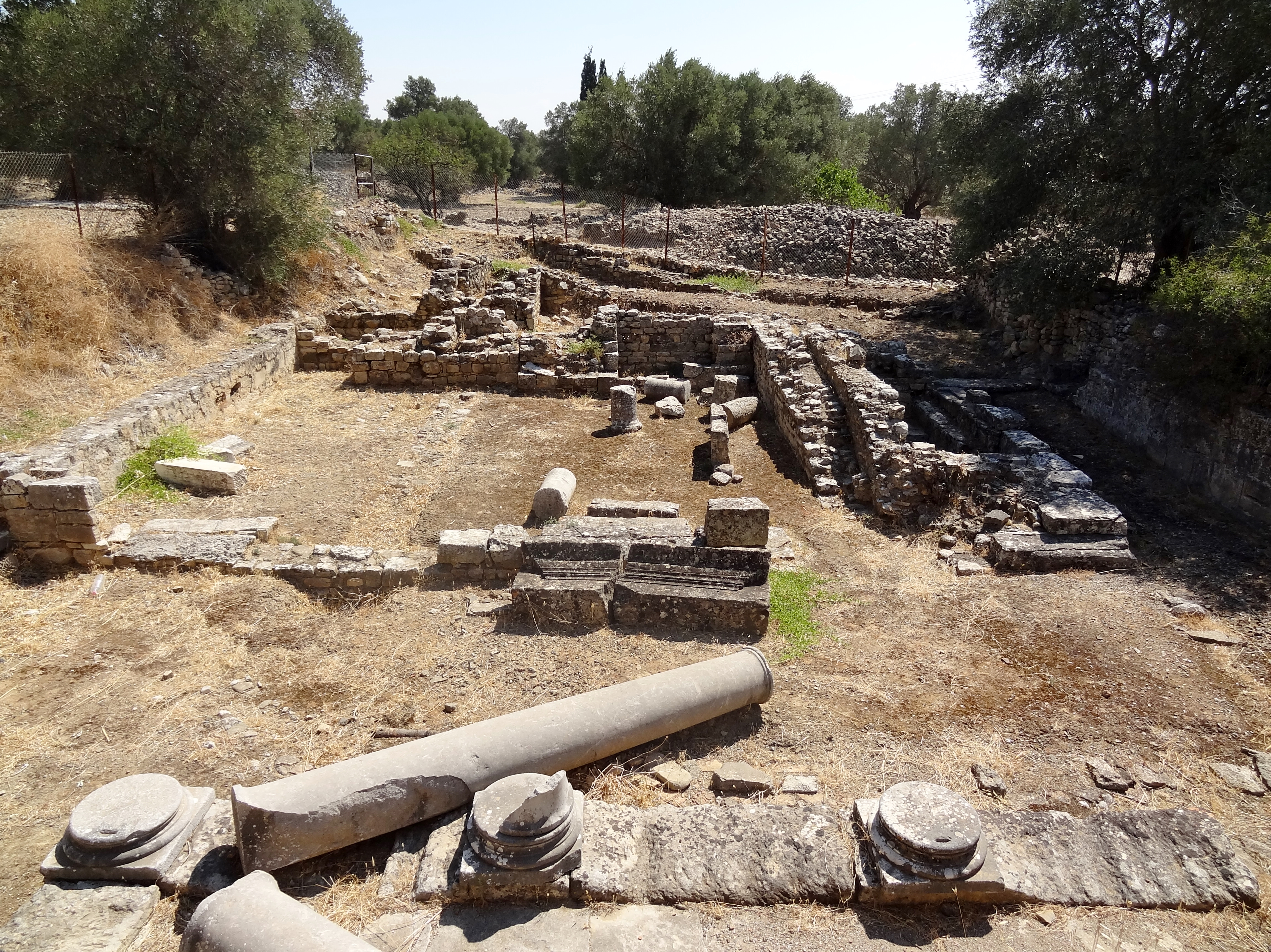 Reste der griechisch-römischen Stadt Gortyn (Γορτύν), Gemeinde Gortyna, Regionalbezirk Iraklio, Kreta, Griechenland